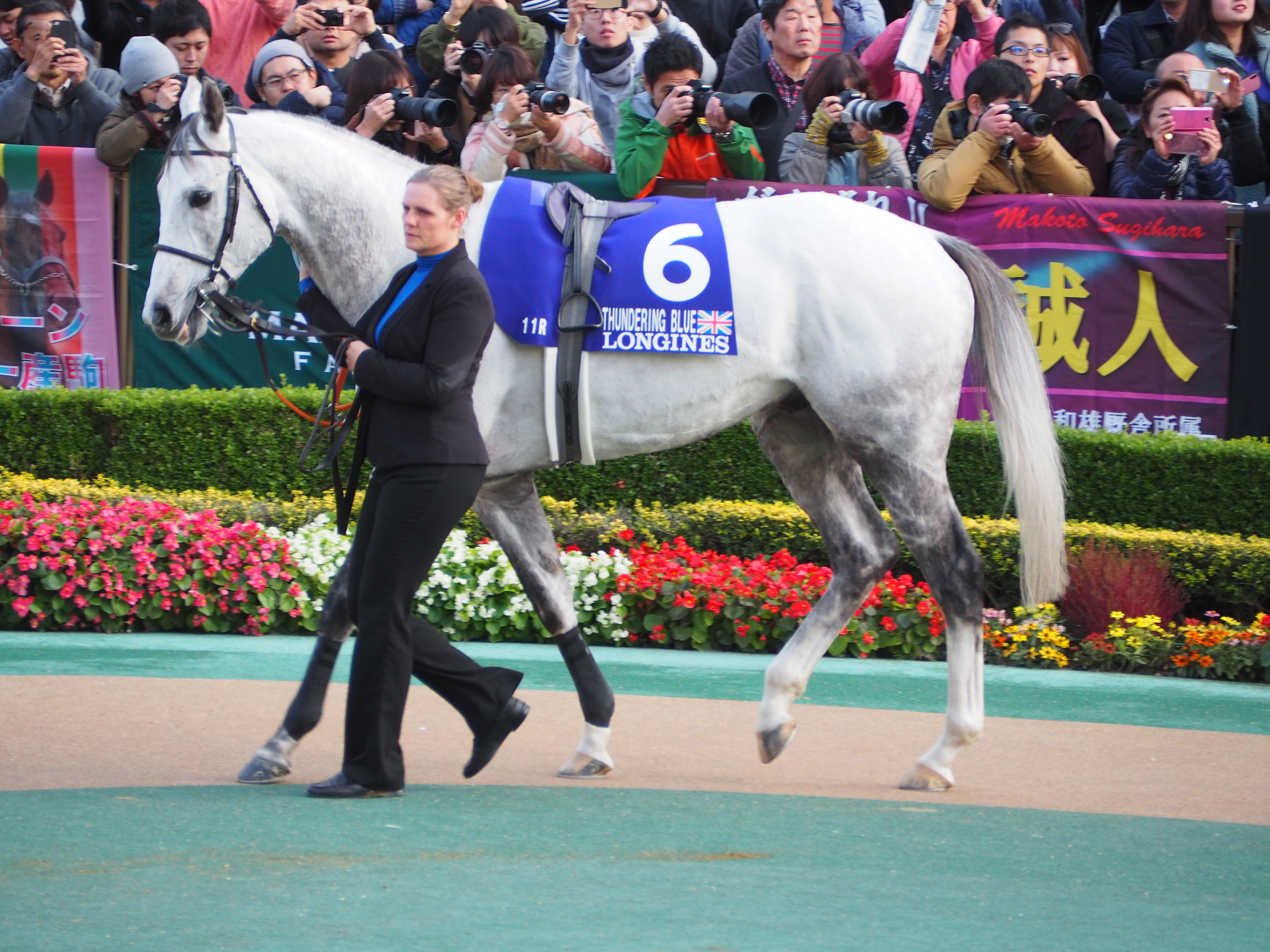 サンダリングブルー ジャパンカップ パドック